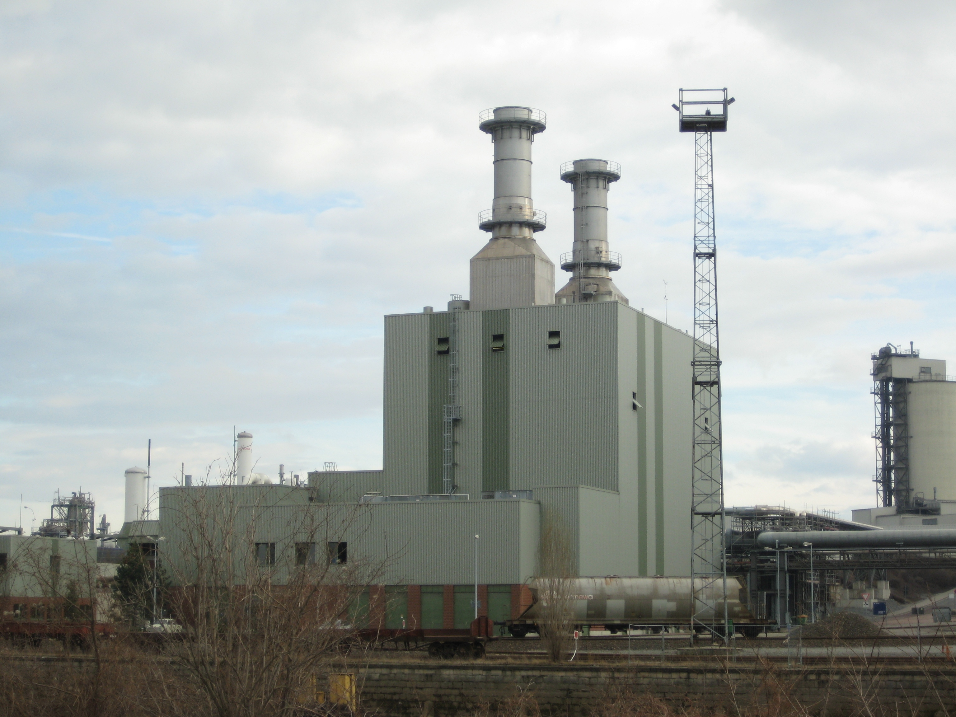 Gasturbinenkraftwerk auf dem Gelände von Solvay, Werk Bernburg